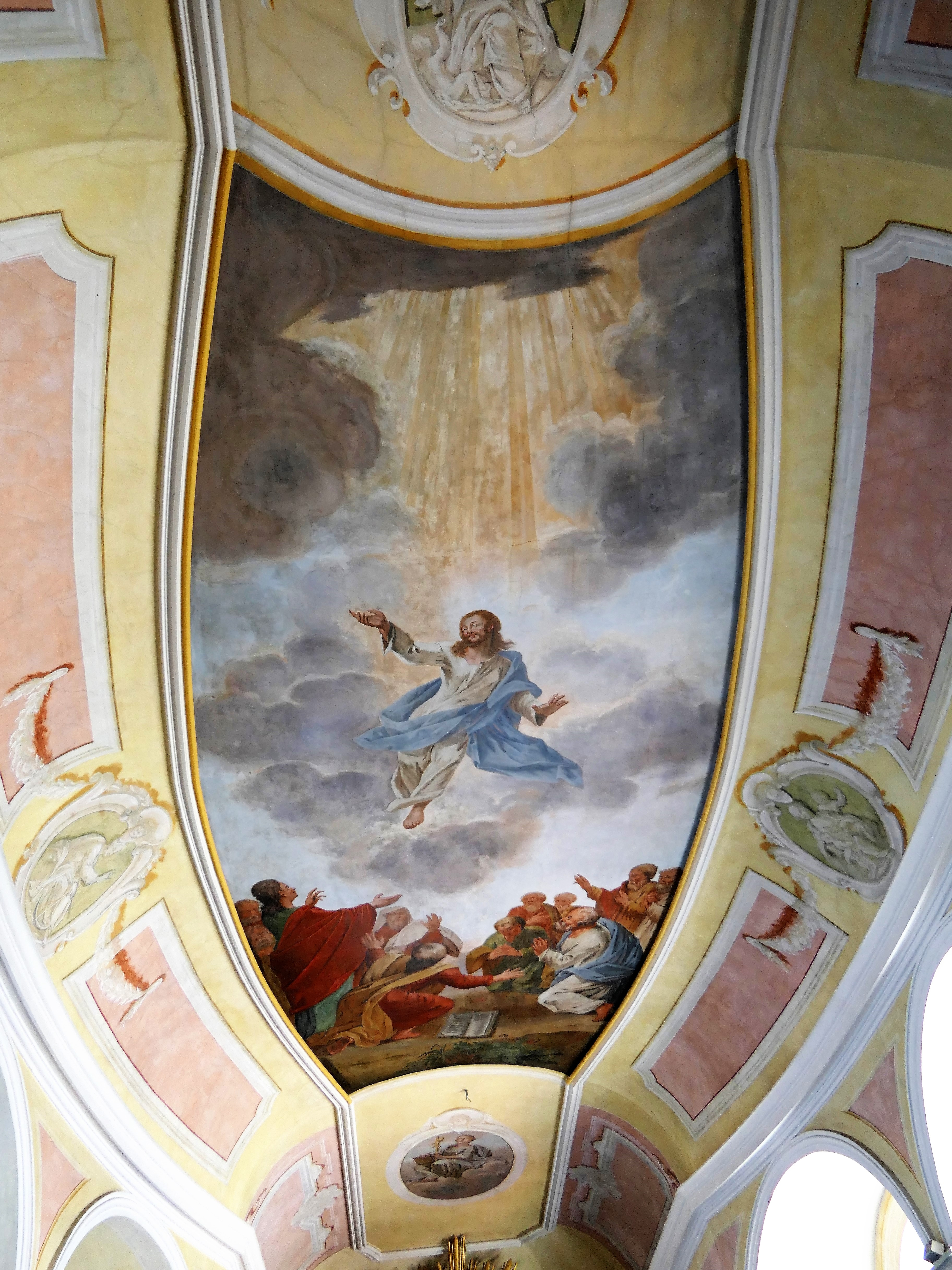 Deckenbemalung in der Schloßkapelle Weesenstein